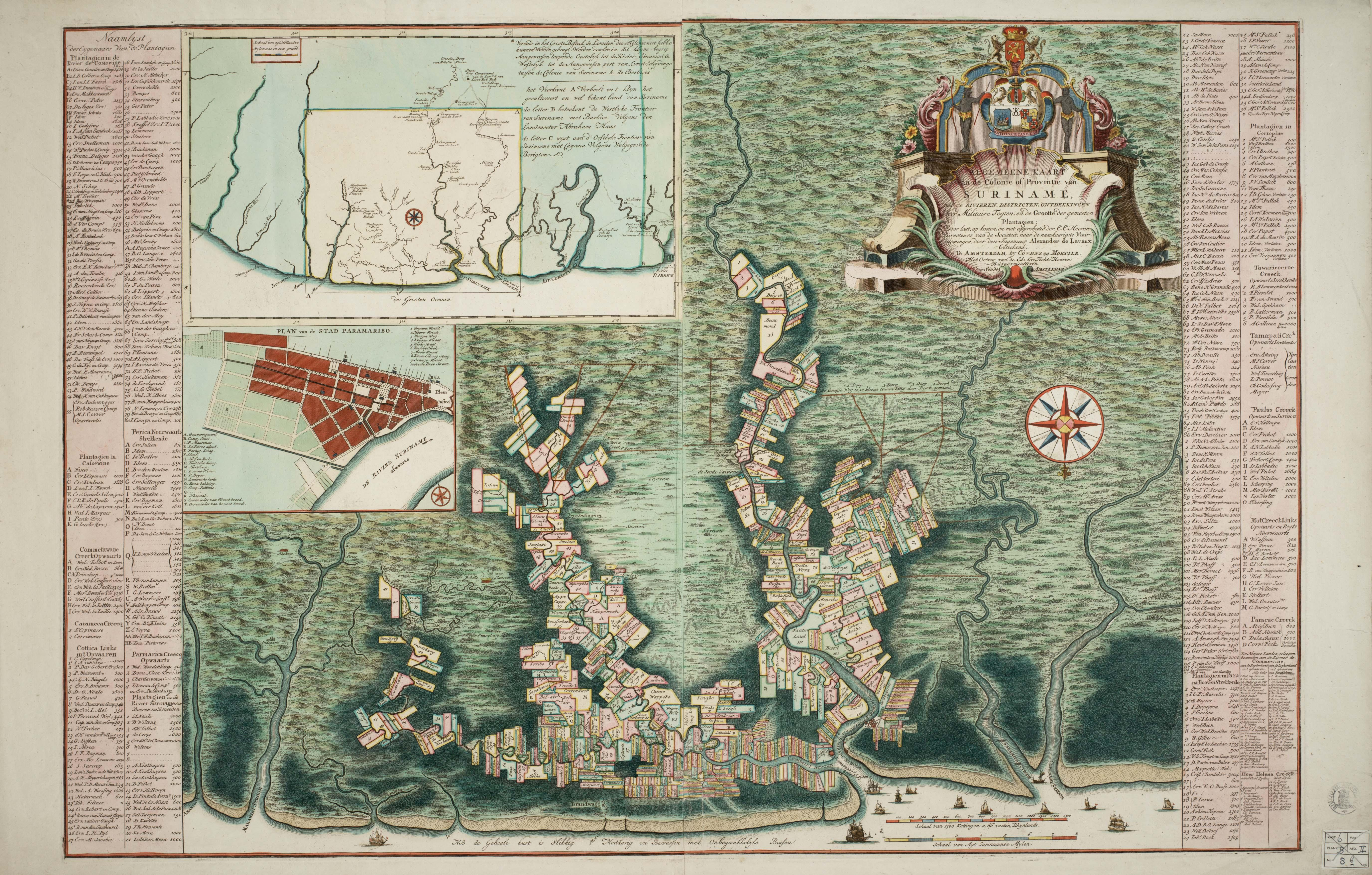 Algemeene kaart van de Colonie of Provintie van Suriname. Omdat de bestaande kaarten van de kolonie niet meer toereikend waren zaten de directeuren van de Sociëteit van Suriname al lang verlegen om een goede nieuwe kaart. Plantage-eigenaren stoorden zich namelijk weinig aan de voorschriften ten aanzien van het meten van hun gronden en het registreren ervan. In 1734 liet Alexander de Lavaux - vaandrig in dienst van de Sociëteit en gezworen landmeter van Suriname - de directeuren weten dat hij al twee jaar bezig was met een nieuwe kaart, die bovendien al bijna gereed was. Op hun verzoek werd de kaart in 1737 in Amsterdam gegraveerd. De kaart, waarvan het noorden onder ligt, omvat in het bijzonder het cultuurgebied langs de Suriname- en Commewijne rivieren. Er zijn 436 plantages op aangegeven, die opgenoemd worden in de legenda, vergezeld van opgaven over oppervlakten en eigenaars. Voor het eerst staan alle cultuurgebieden in de omgeving op één kaart ingetekend. In de binnenlanden zien we o.m. 'wegloopers dorpen' die in brand staan en andere getuigenissen van acties tegen de Marrons waarbij De Lavaux betrokken is geweest.